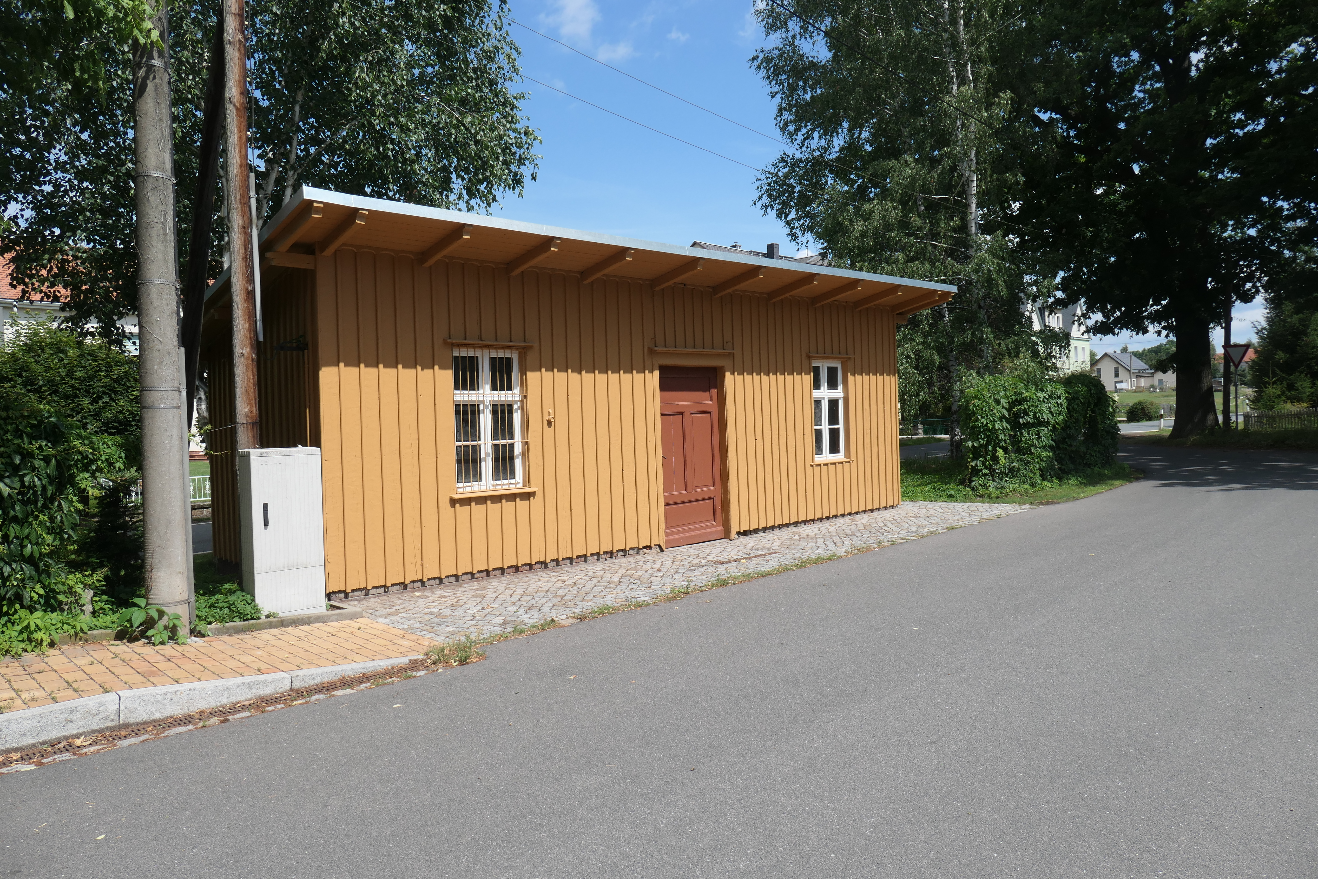 erhaltenes Stationsgebäude in Helbigsdorf